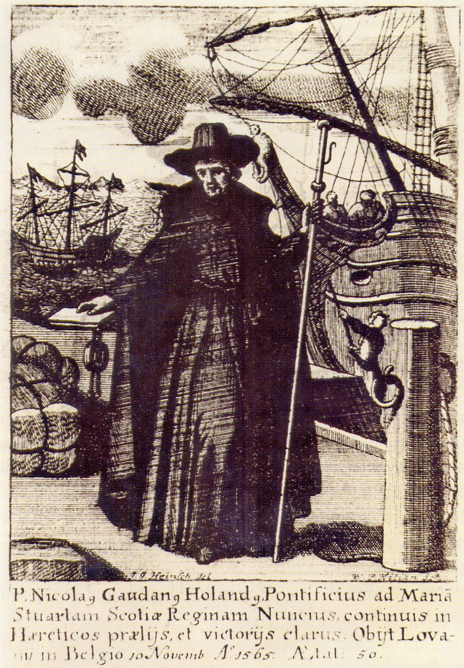 prent met een afbeelding van Nicolaas Goudanus, als pauselijk gezant naar Maria Stuart